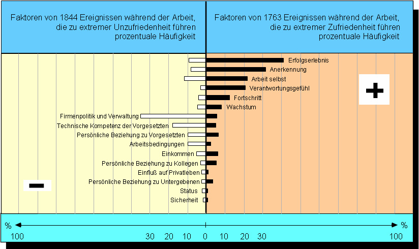 Herzbergs Faktoren